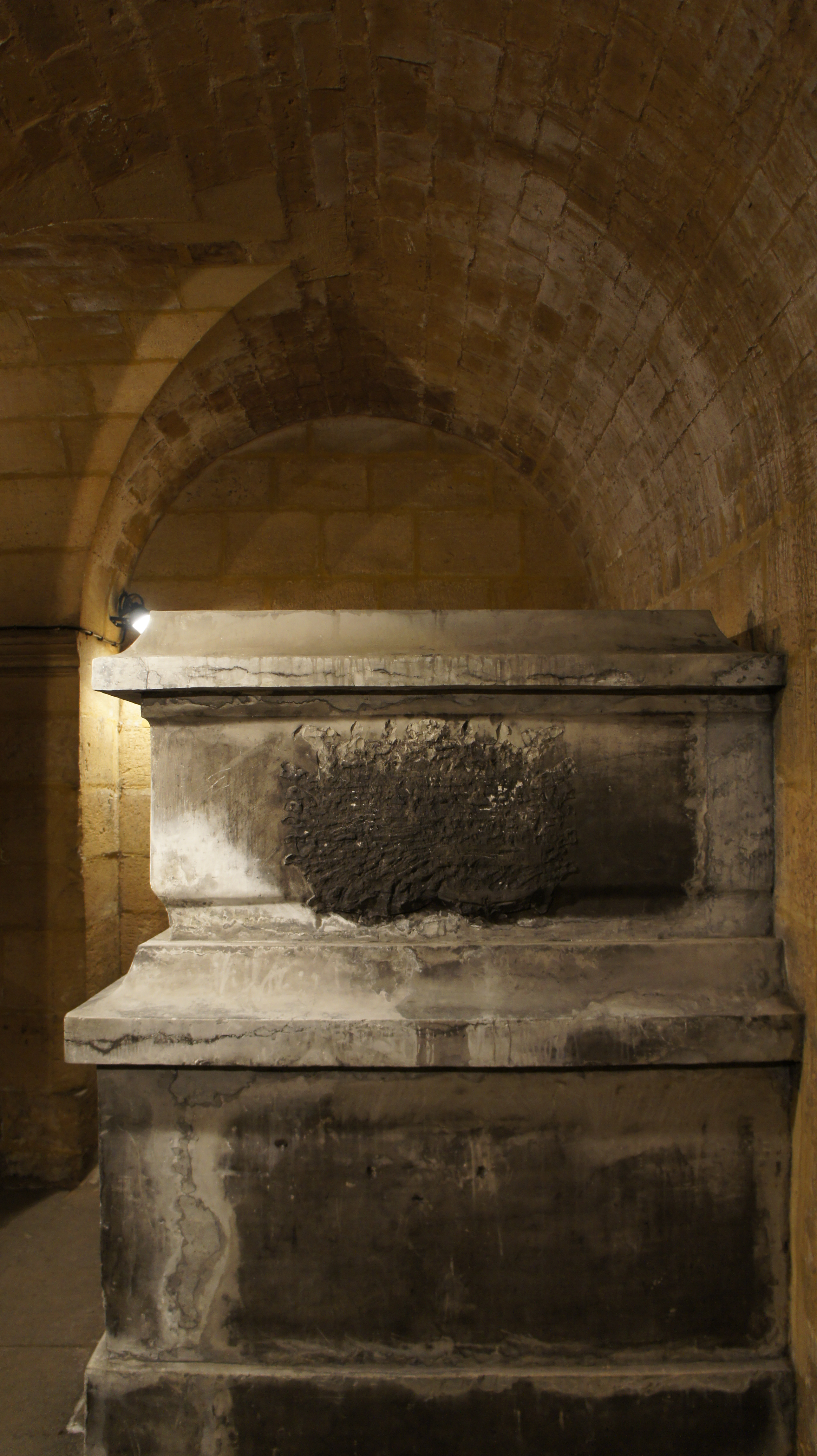 Le tombeau de Fabert, martelé avec voûte en plein ceintre.